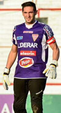 Maximiliano Gagliardo